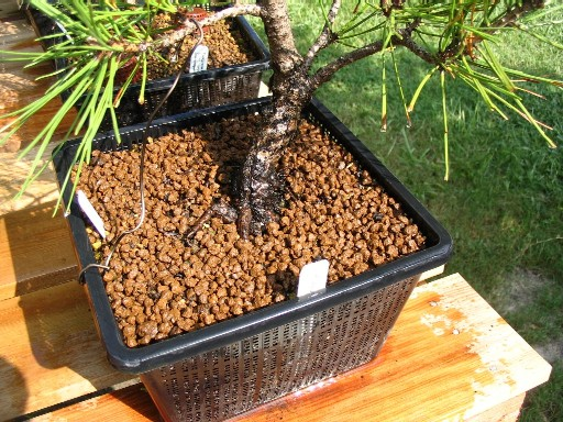 Akadama